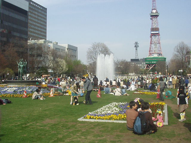 Ōdōri Park. Sapporo, Hokkaidō, Japan.